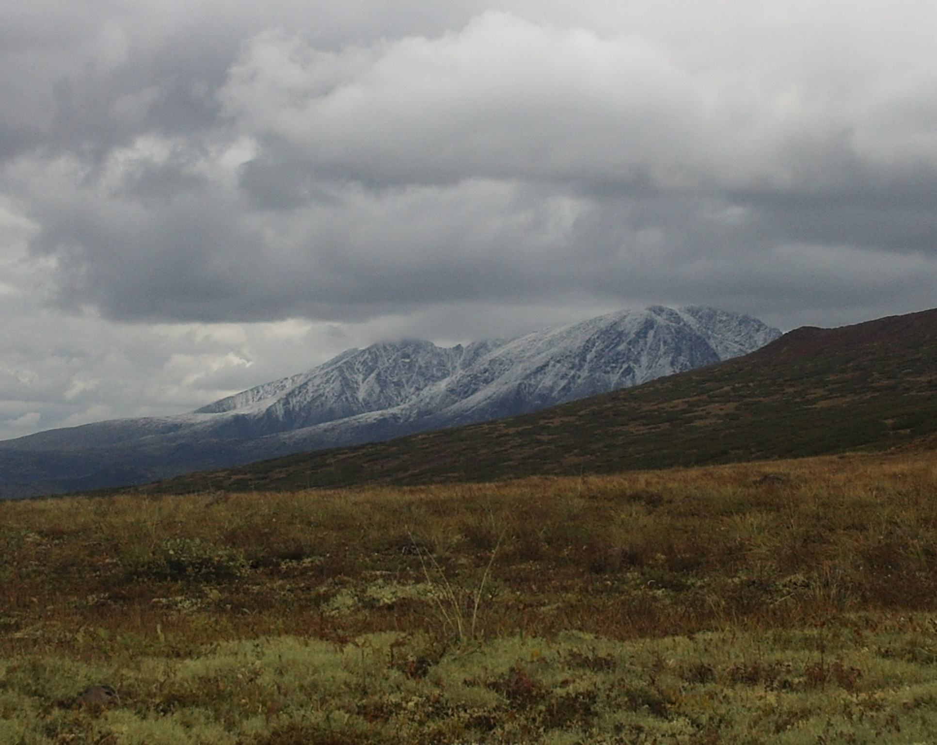 Вид на голец Иняптук с отрогов гольца Довырен. На переднем плане горно-тундровая растительность.